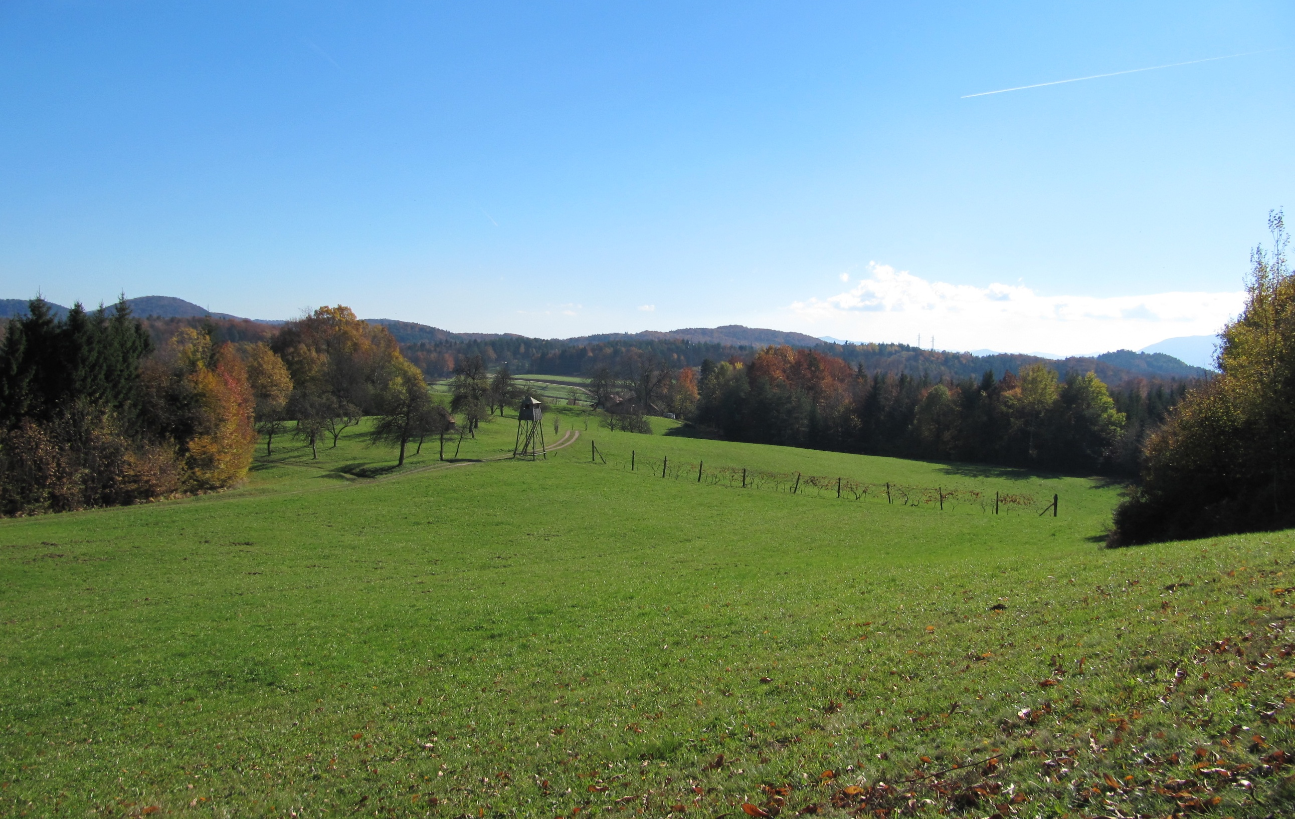 Ponikovski kras pri naselju Ponikva pri Žalcu